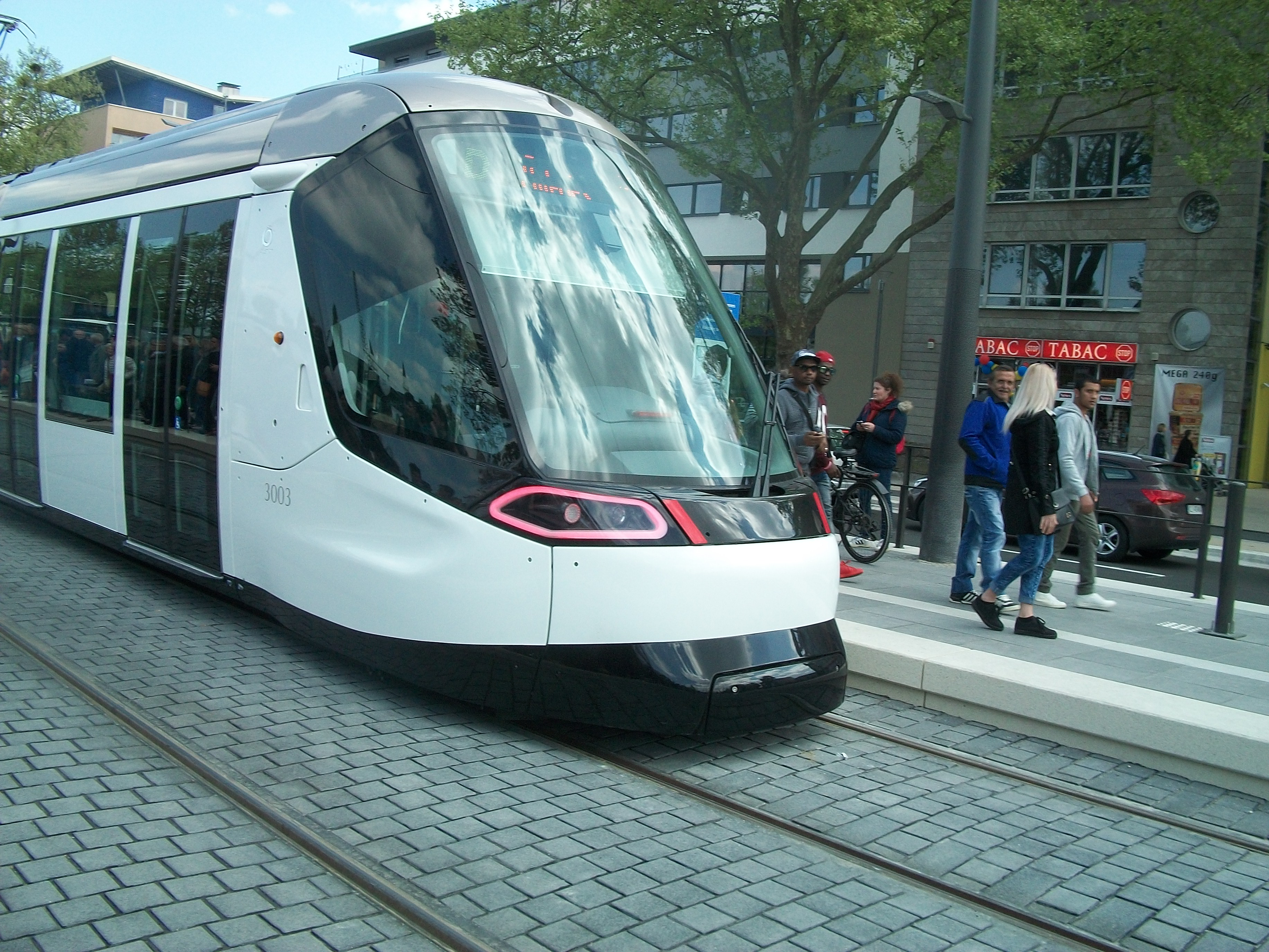 Arrière d'une des rames Citadis II (3003)